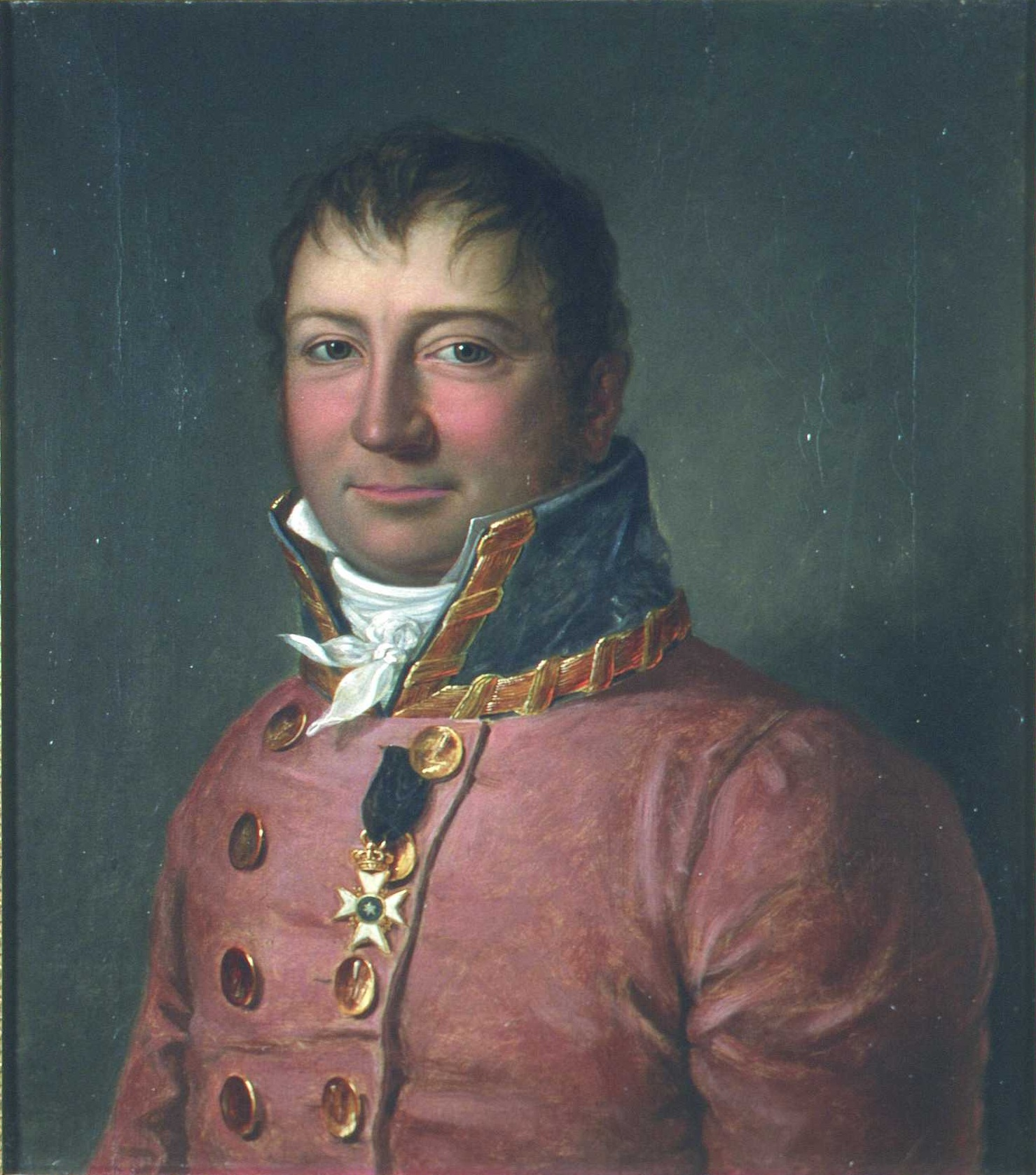 Rød sorenskriveruniform, høy krave med gull, hvitt kalvekryss. 1 ordensstjerne.